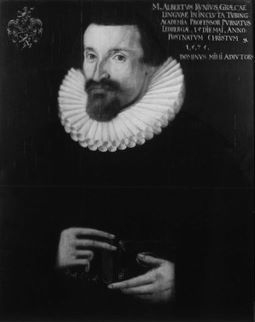 Albert Kunius (1575-1611); Gemälde in der Professorengalerie Tübingen